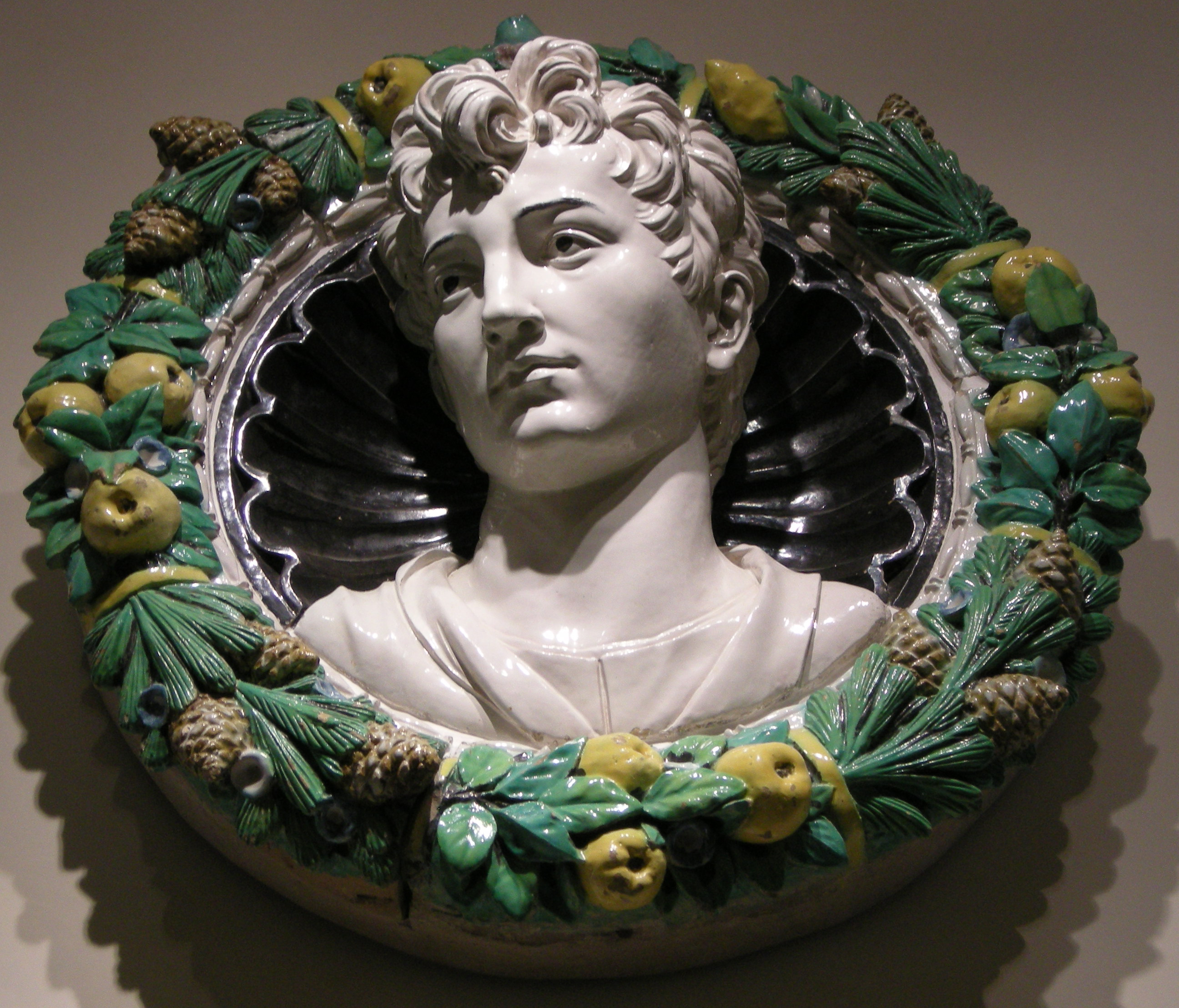 Andrea della robbia, effige ideale di giovane, 150 circa